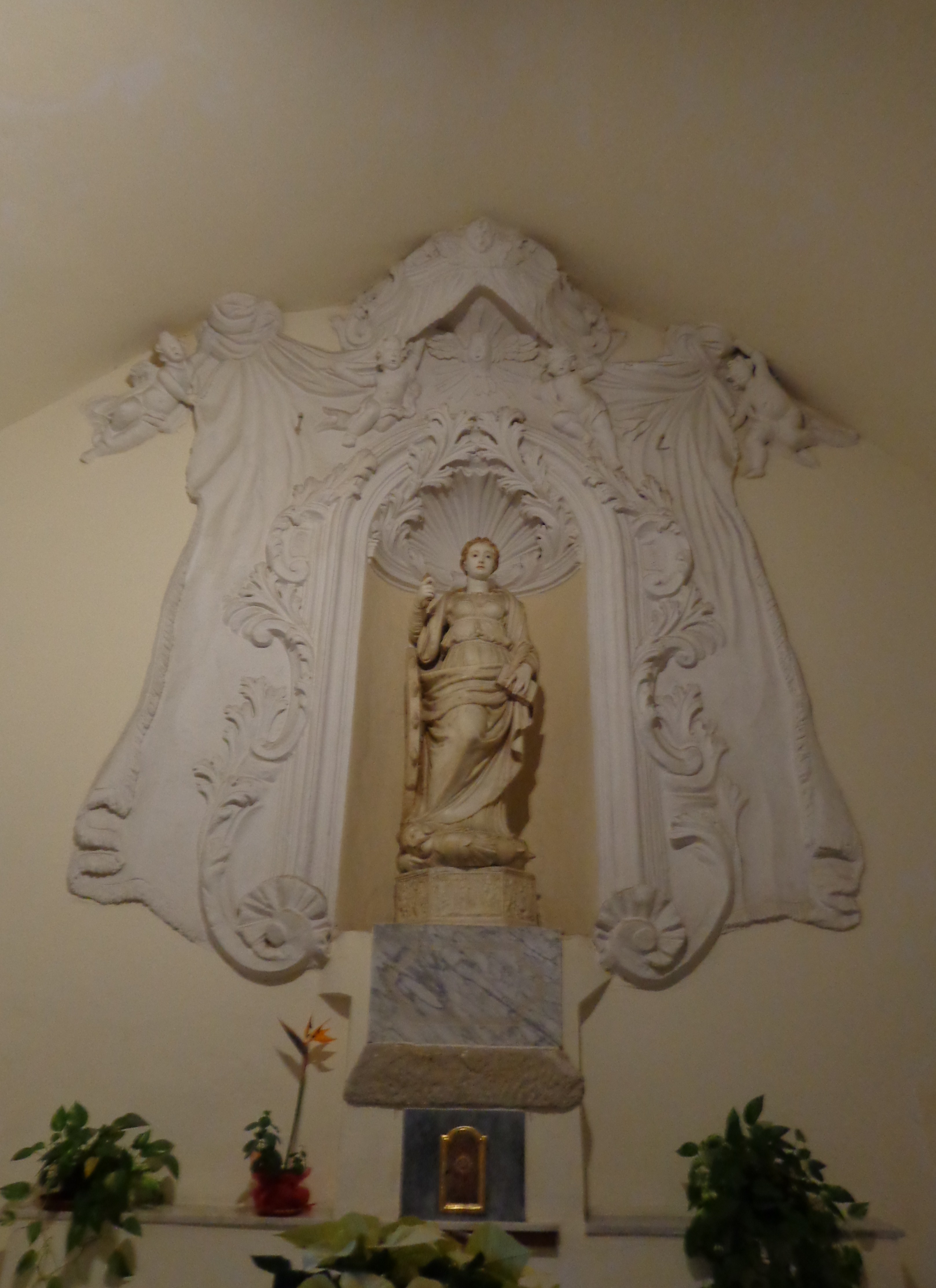 Santa Caterina d'Alessandria custodita nella Chiesa di Santa Caterina d'Alessandria di Milazzo